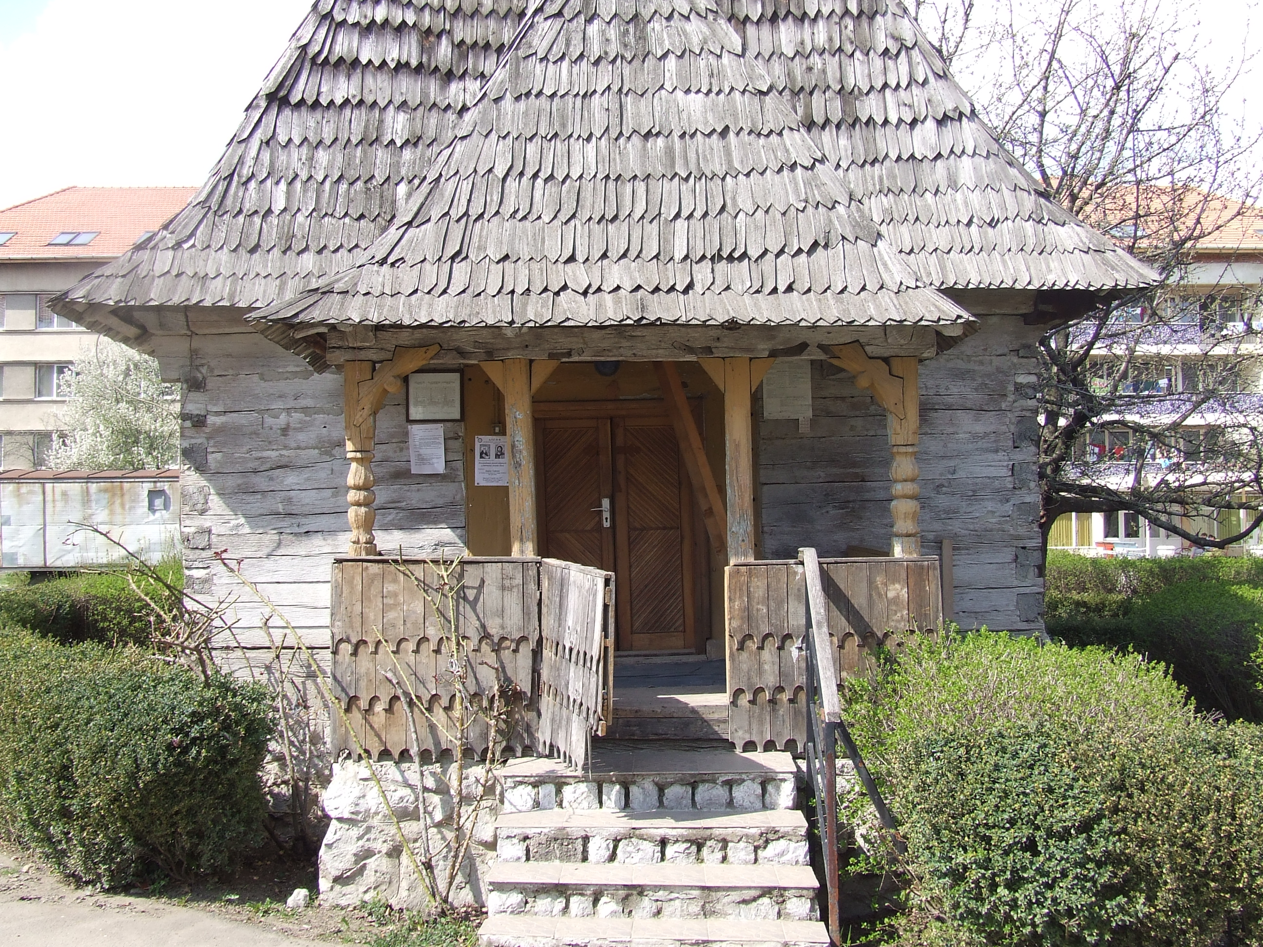 Intrarea în biserică, Biserica de lemn Sf Arhangheli din Letca, jud. Sălaj